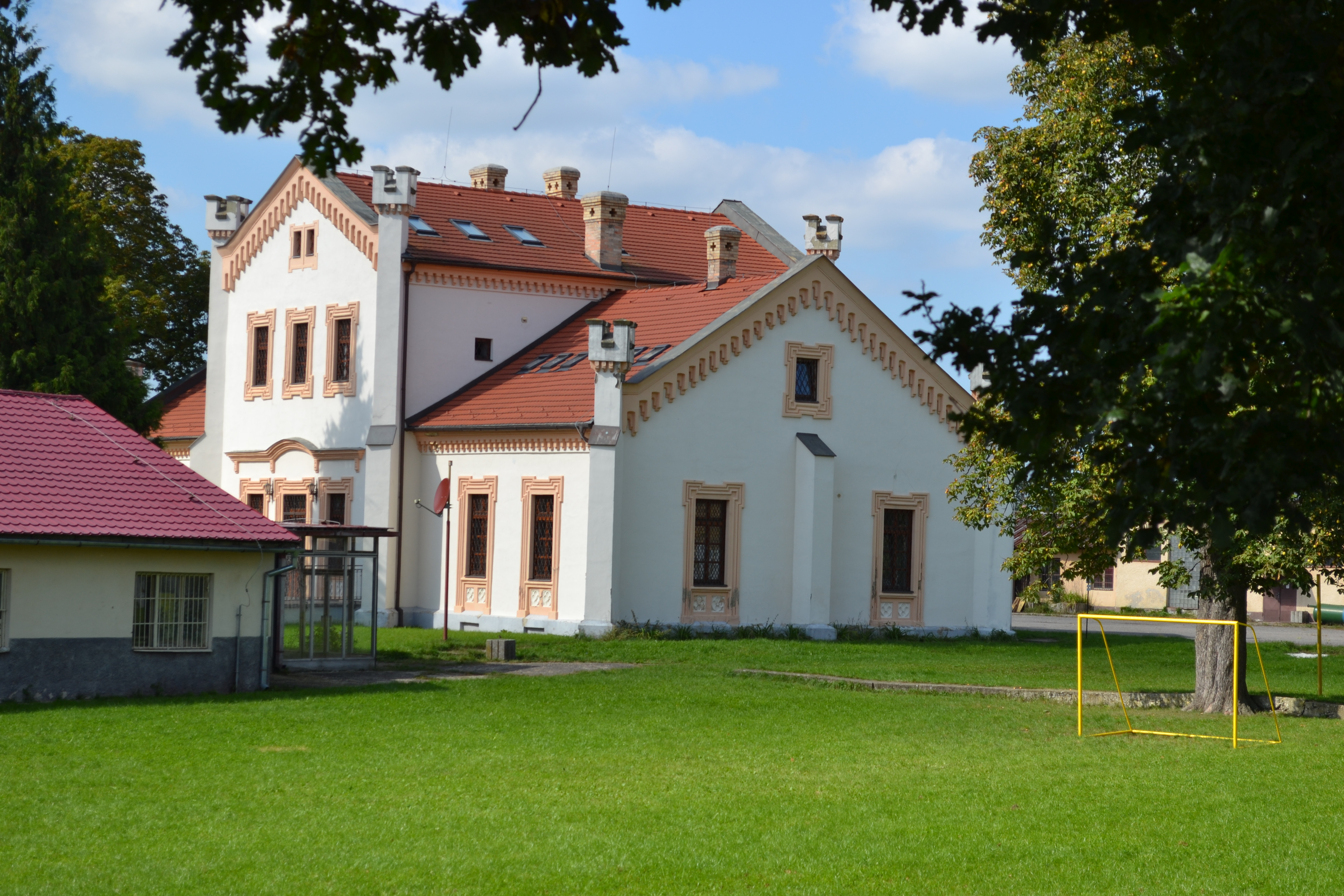 Neskoro-klasicistická kúria s historizujúcou fasádou v Čerenčanoch. (tzv. Zmeškalova kúria)